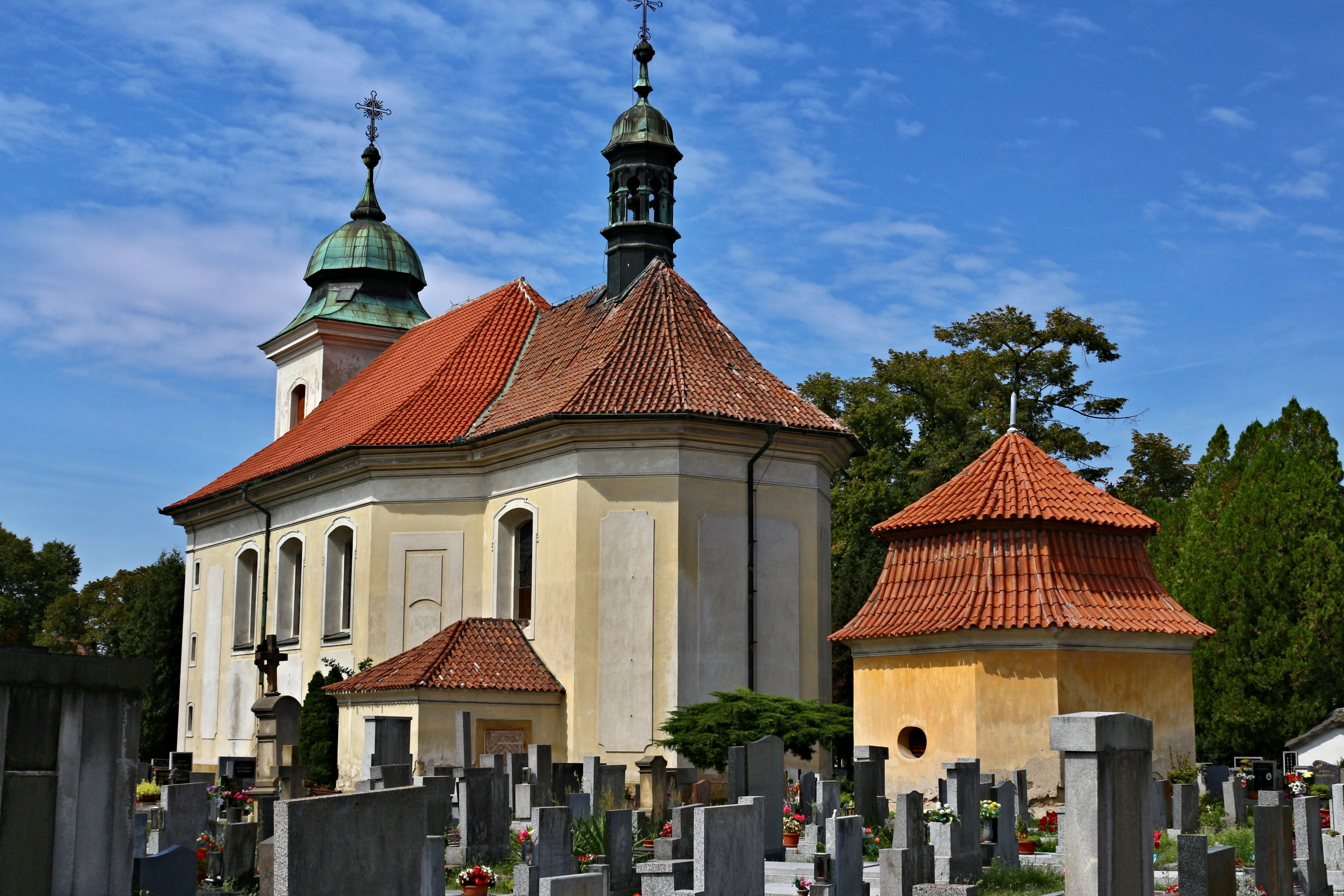 Benátky nad Jizerou-Staré Benátky, hřbitov a kostel